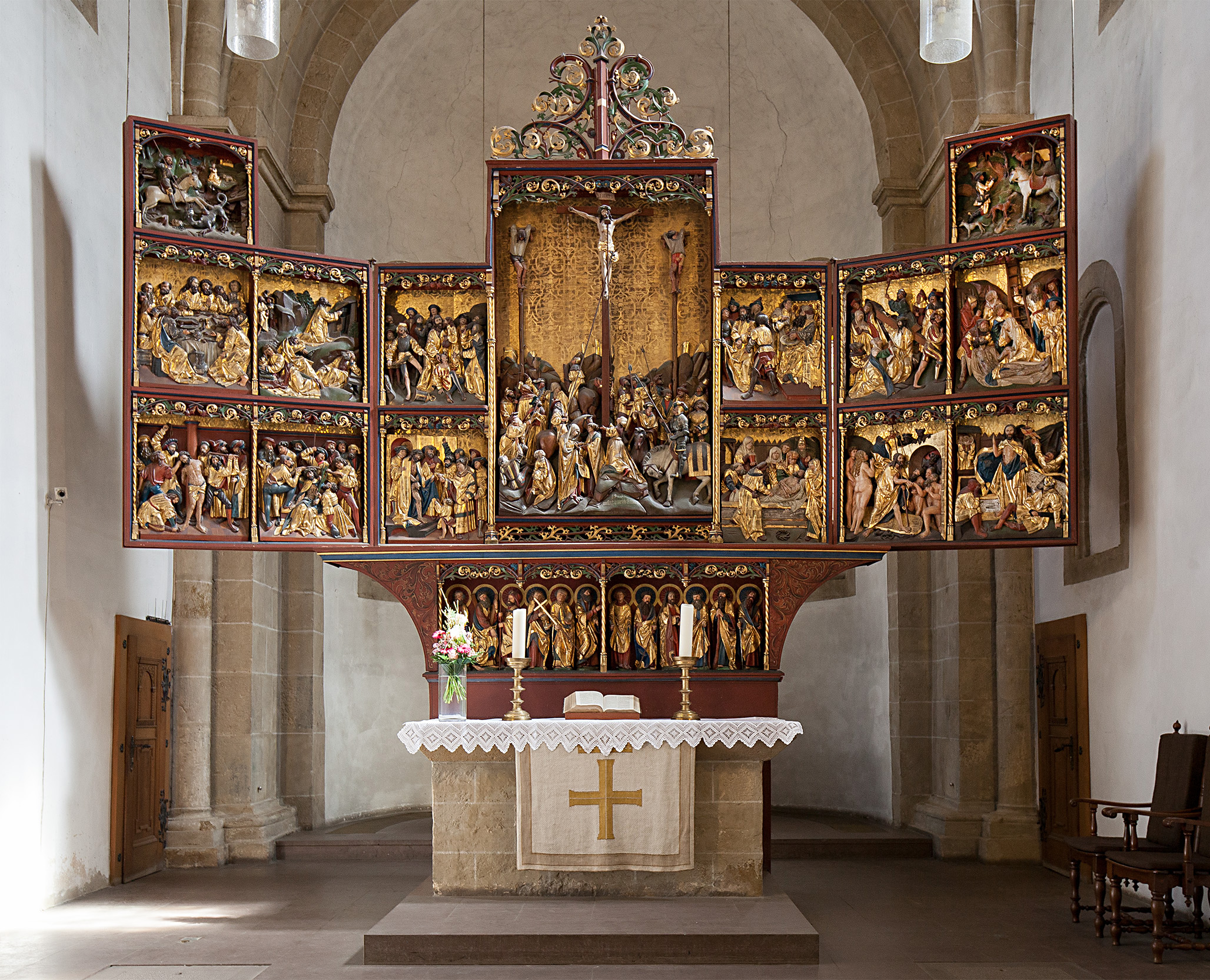 Schnitzaltar von Hinrik Stavoer aus dem Jahre 1525 in der Stiftskirche in Enger, Kreis Herford, Nordrhein-Westfalen.